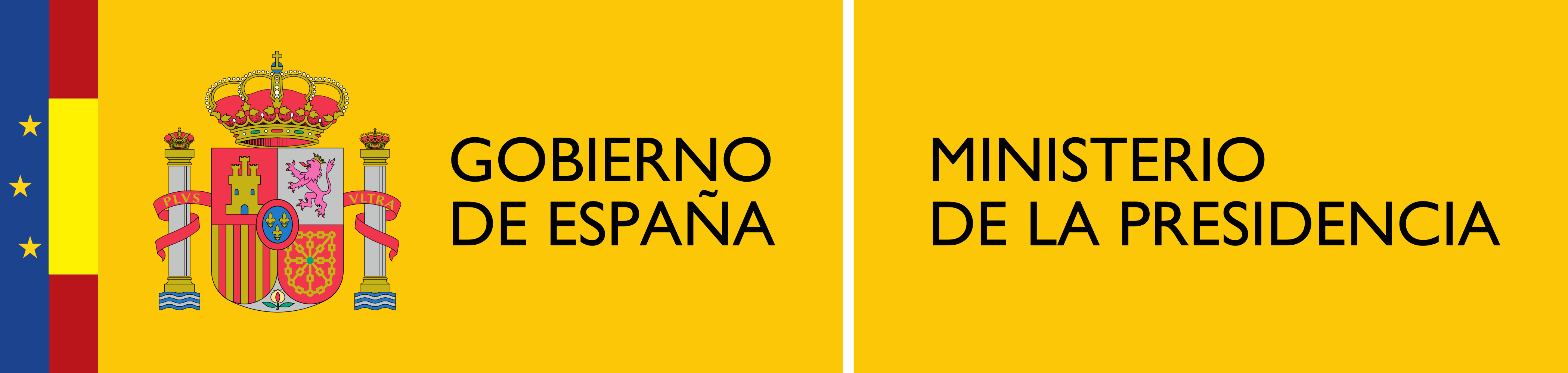 Logotipo del Ministerio de la Presidencia